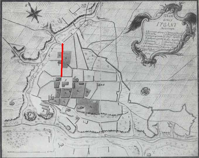 Вуліца Савецкая на пляне Гродна 1758